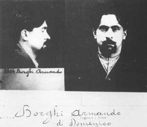 Armando Borghi, né le 6 avril 1882 à Castel Bolognese, dans la province de Ravenne, en Émilie-Romagne et mort le 21 avril 1968 à Rome, est un anarchiste et un journaliste italien.